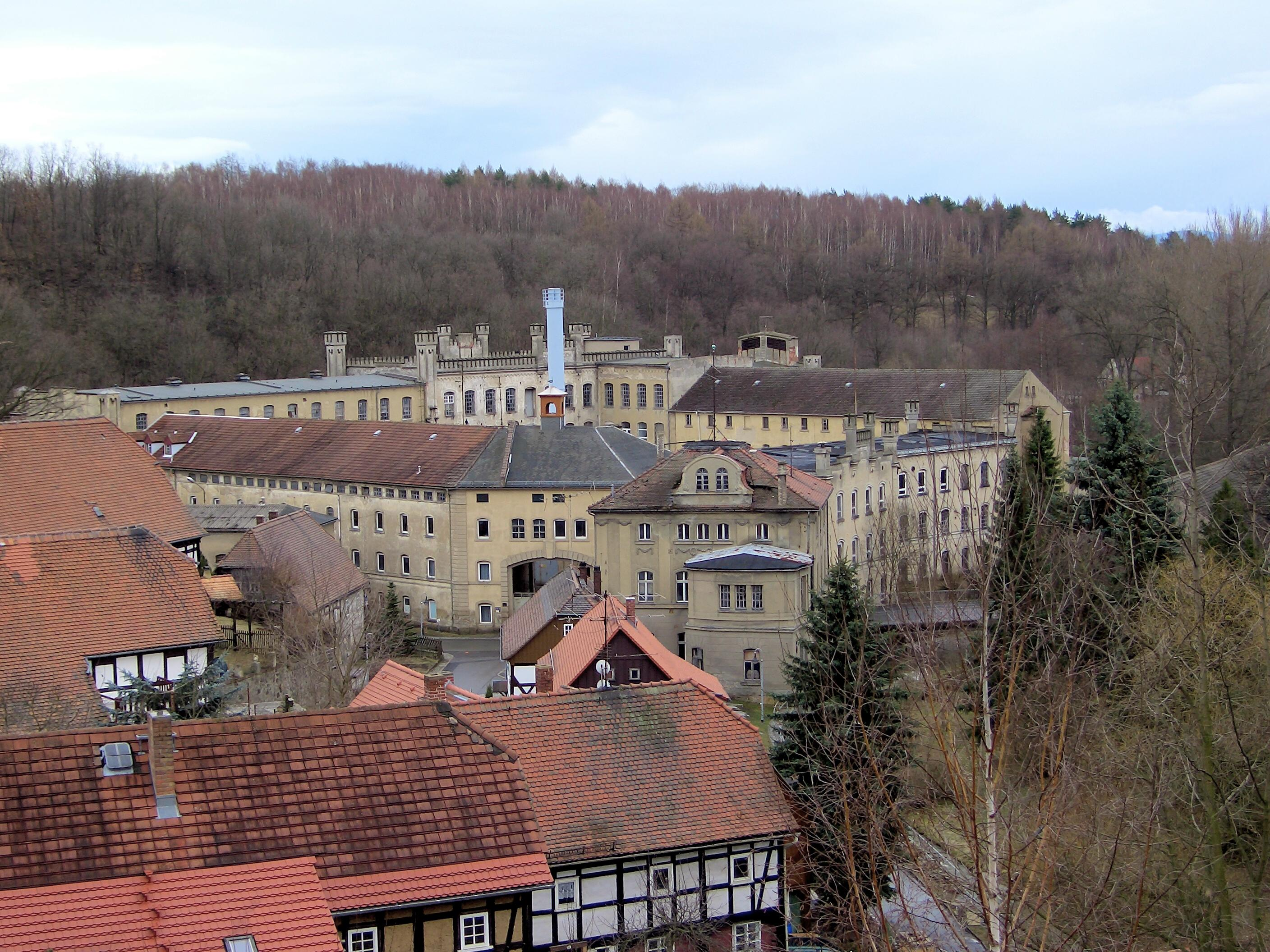 Aufnahme des 2003 stillgelegten Betriebes letzter Firmenname: Hirschfelder Leinen GmbH im Mai 2006 begann der Abriss der Wald im Hintergrund gehört zur Ortschaft Trzciniec (bis 1945 Rohnau) der polnischen Gemeinde Bogatynia